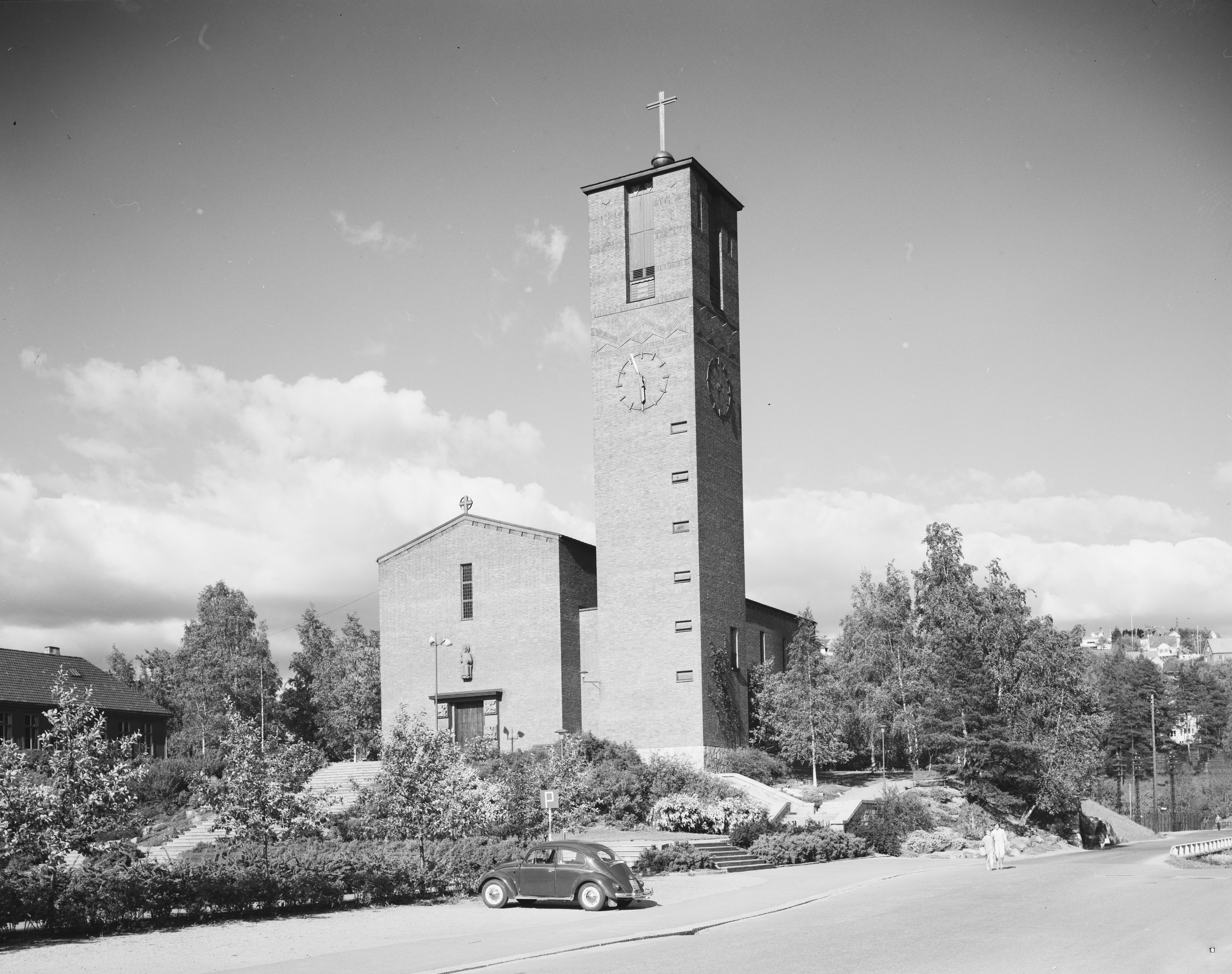 Bildet er hentet fra Nasjonalbibliotekets bildesamling. Anmerkninger til bildet var: Fotograf: ÅM Notodden, Notodden, Telemark